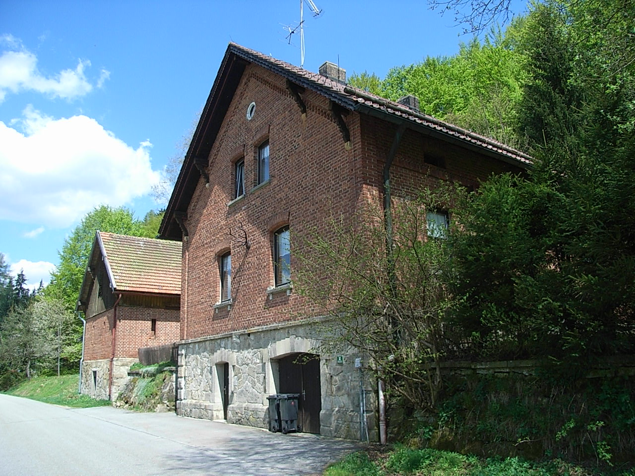 Das Forsthaus von Scheuereck, heute Nationalpark-Dienststelle